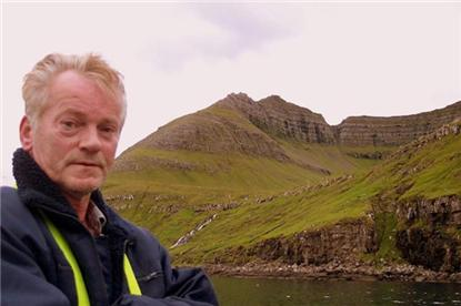 Føroyskt: Mynd av Alexandur Kristiansen.